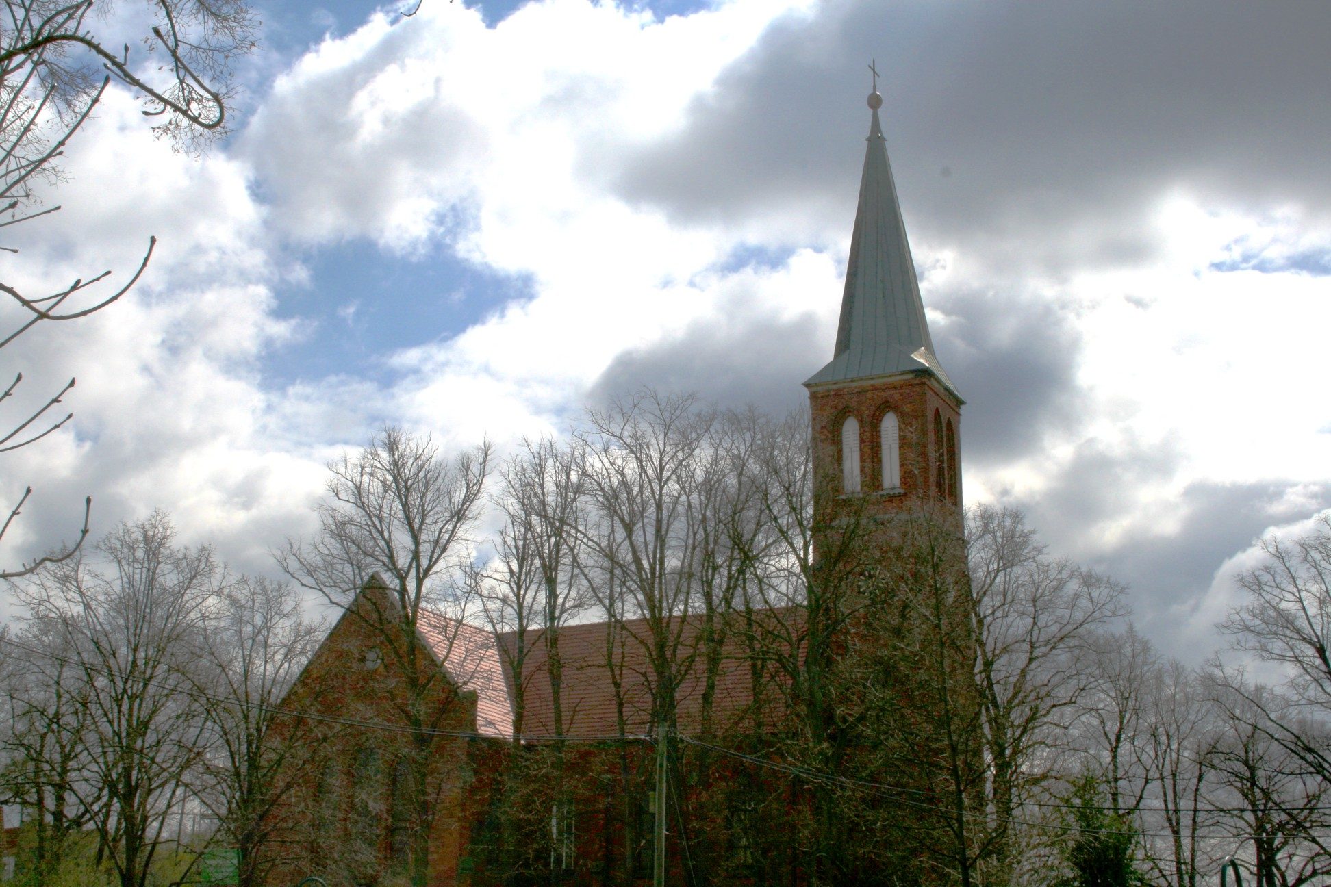 erbaut:1883/84/ ist die einzige Kilianskirche in der Landeskirche Anhalt